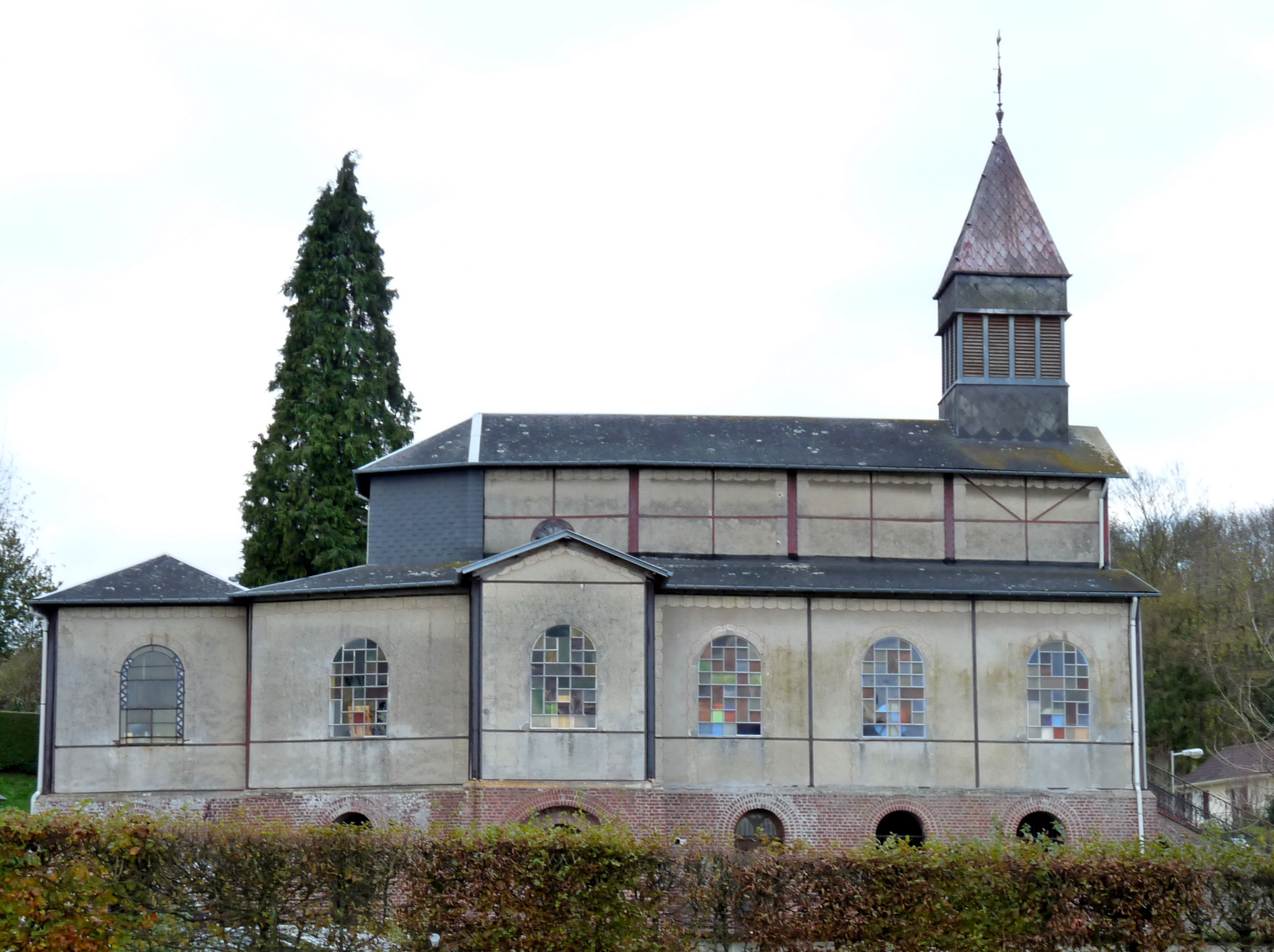 Église Saint-Jean-Baptiste